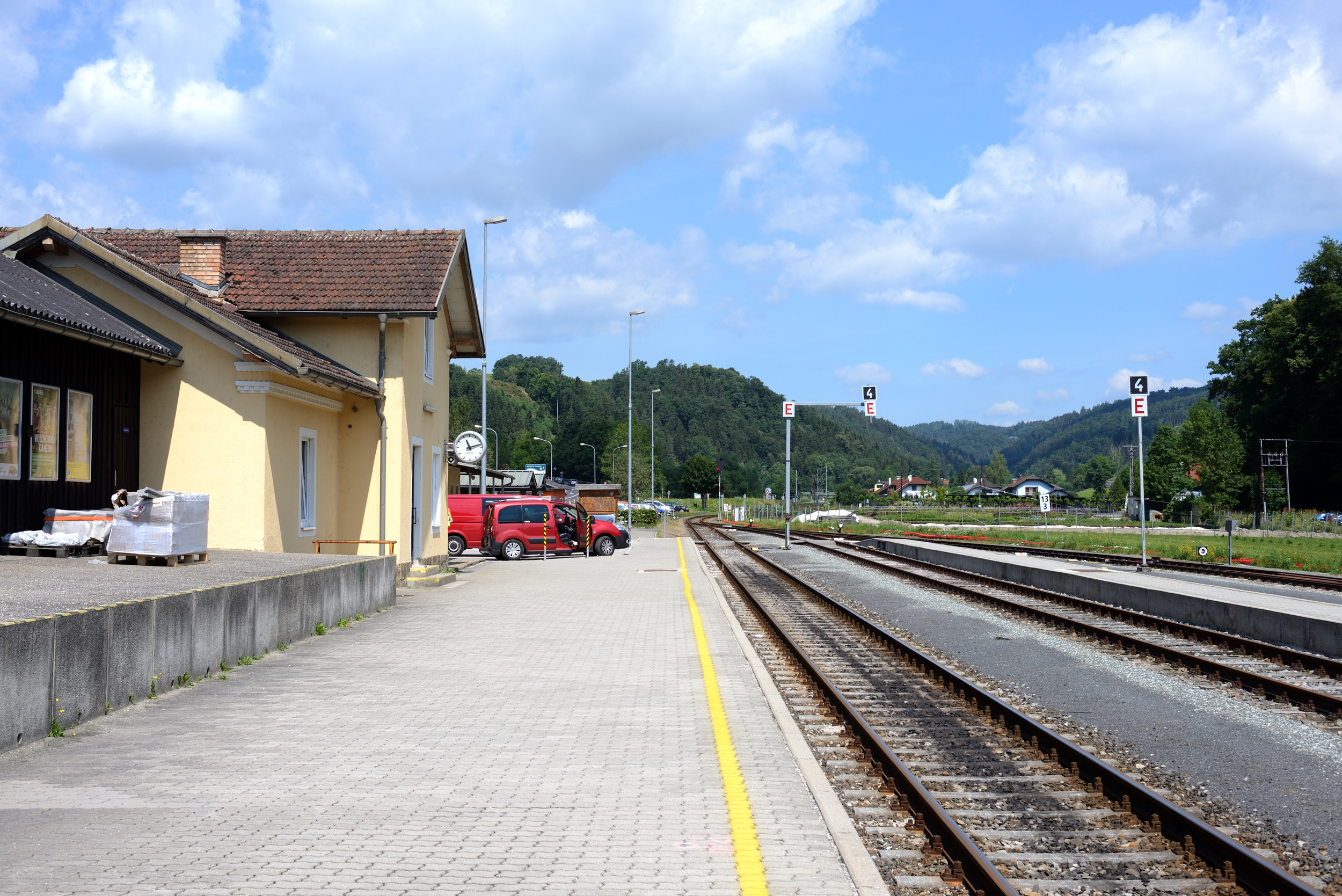 Bahnsteig 1 des Bhf. Rottenegg